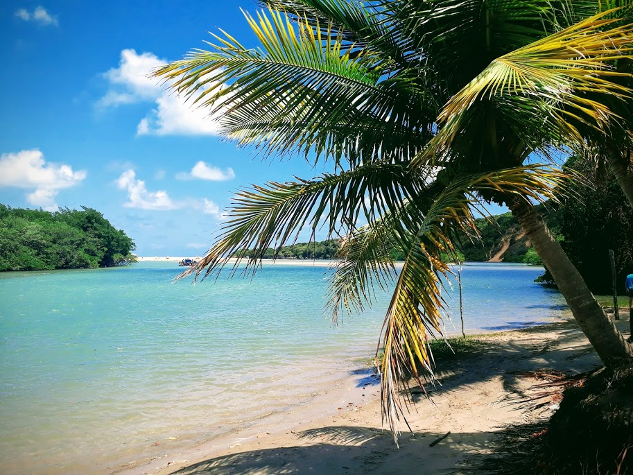 Estuário do Rio Camaratuba